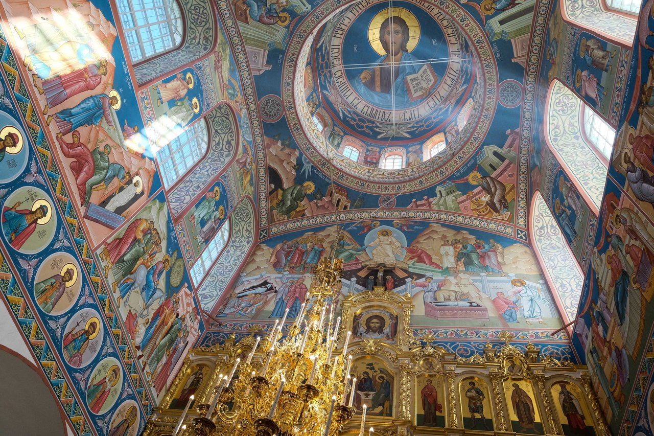 Иконостас, барабан